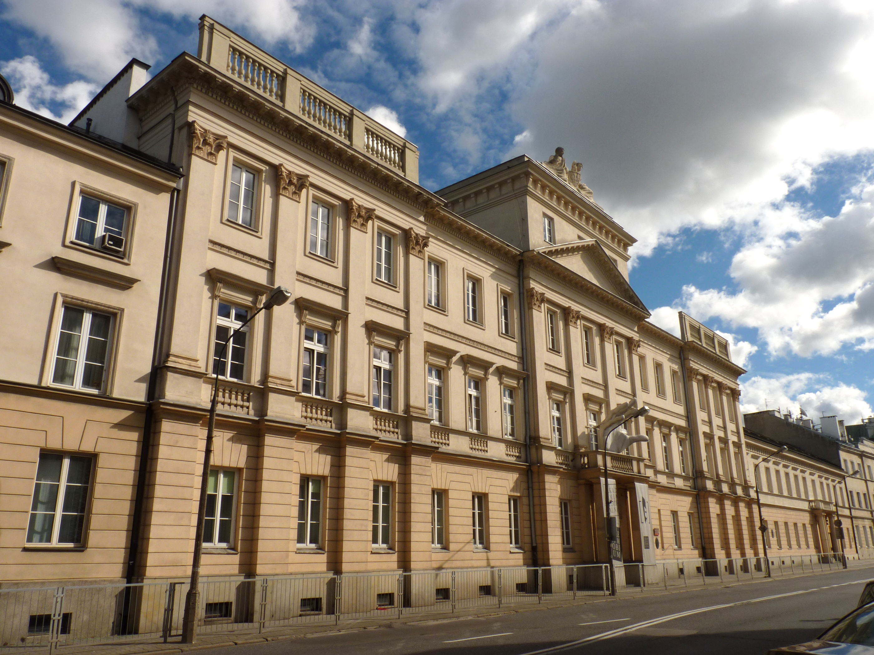 Warszawa, Colegium Nobilium